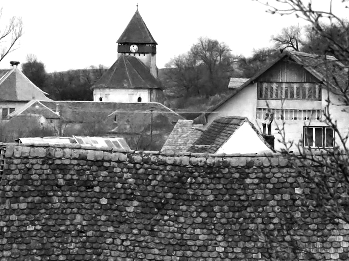 Kirchturm von Hahnbach - Hamba church